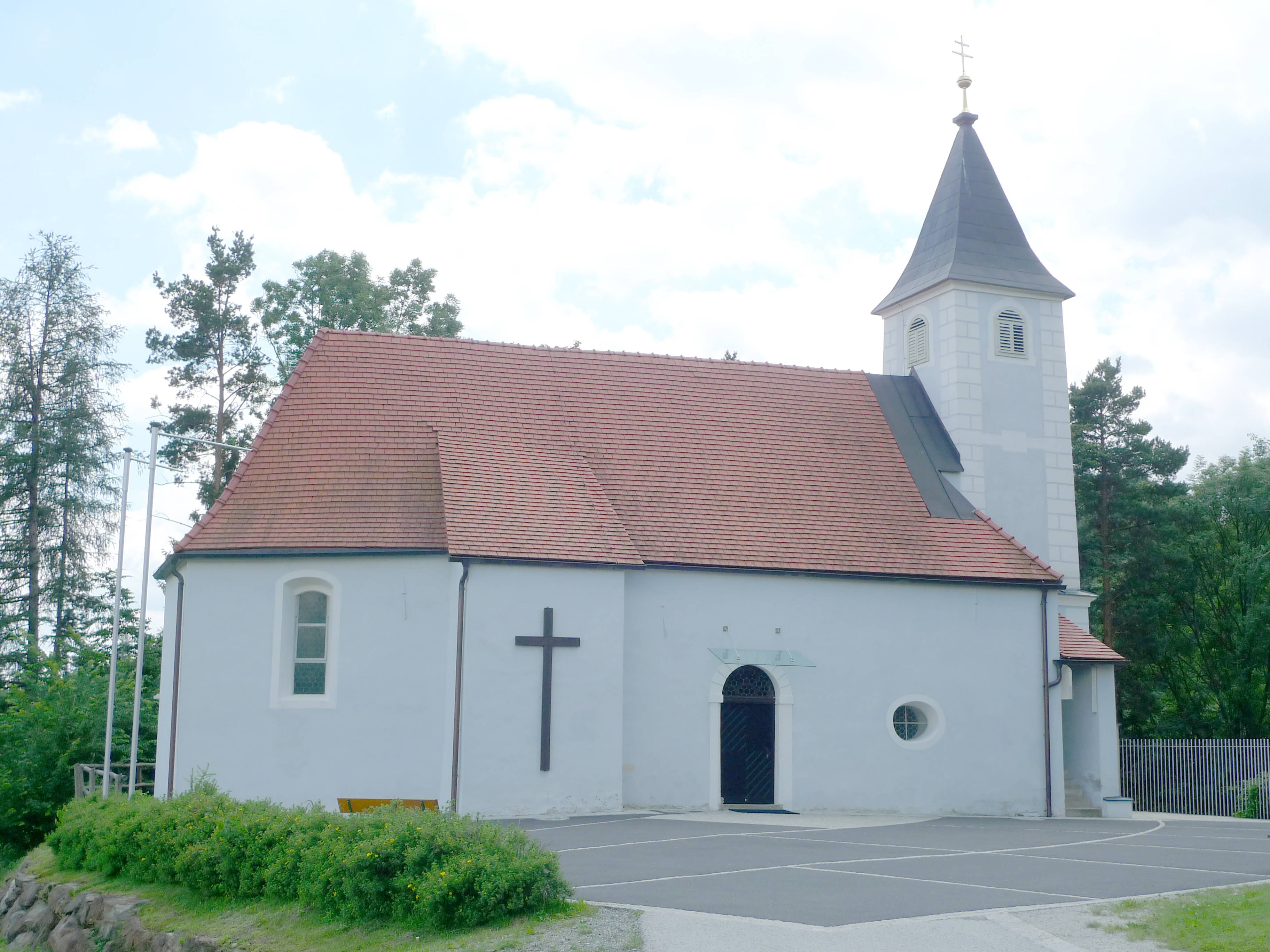 Kath. Pfarrkirche hl. Johannes der Täufer